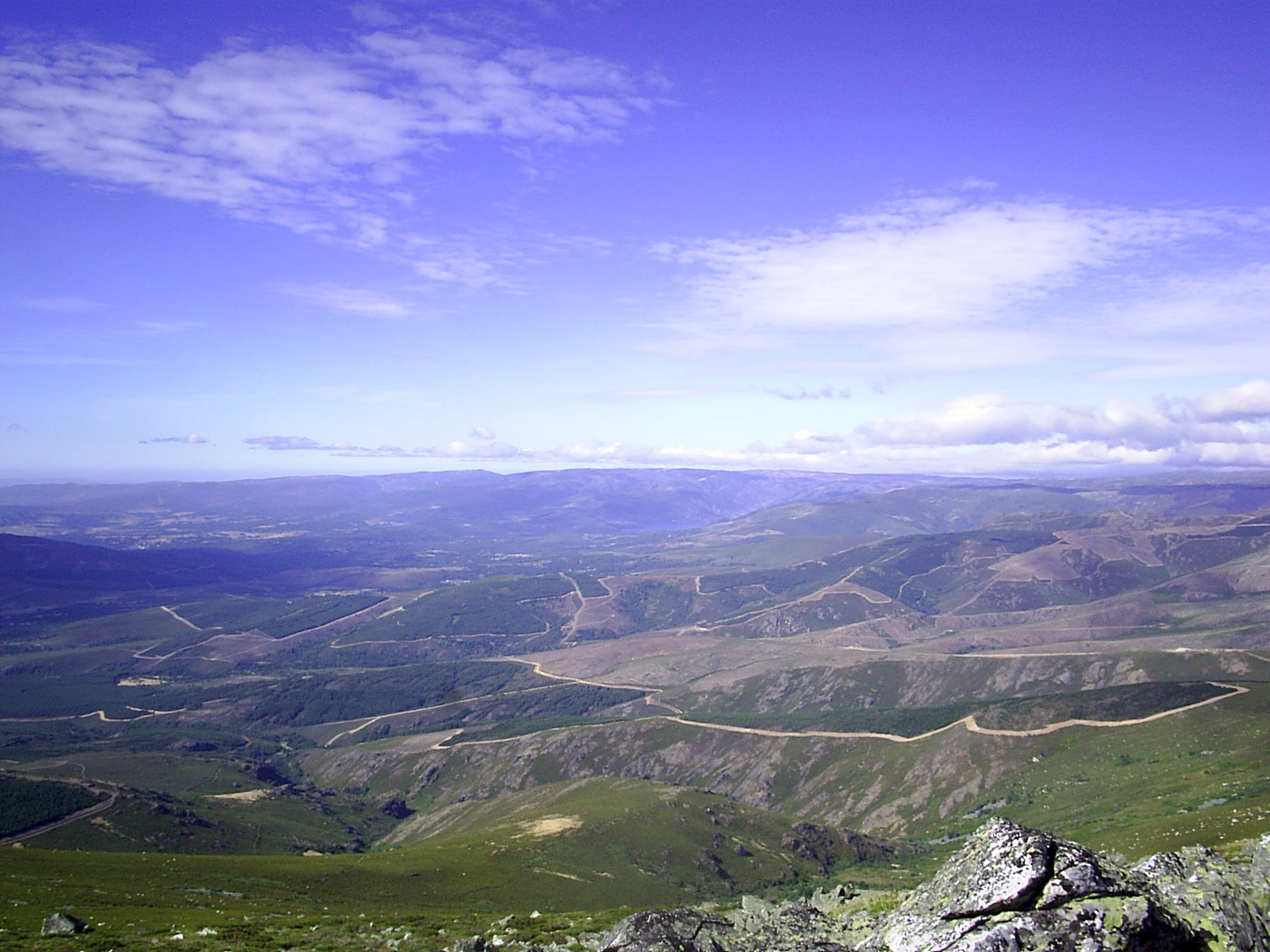 Vista de la comarca leonesa La Cabrera desde el Pico Vizcodillo